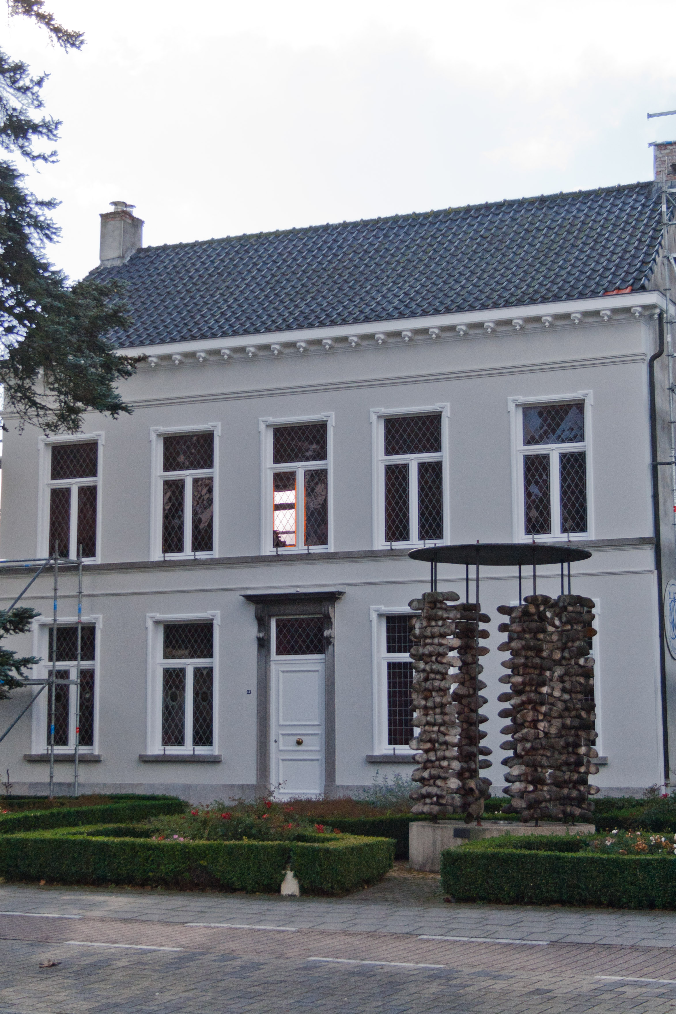 Oud burgerhuis. Momenteel politiekantoor en gemeentehuis. Nieuwkerken-Waas, België